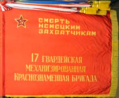 Боевое Знамя. 17-я гвардейская механизированная Краснознамённая бригада. (Лицевая сторона) правая